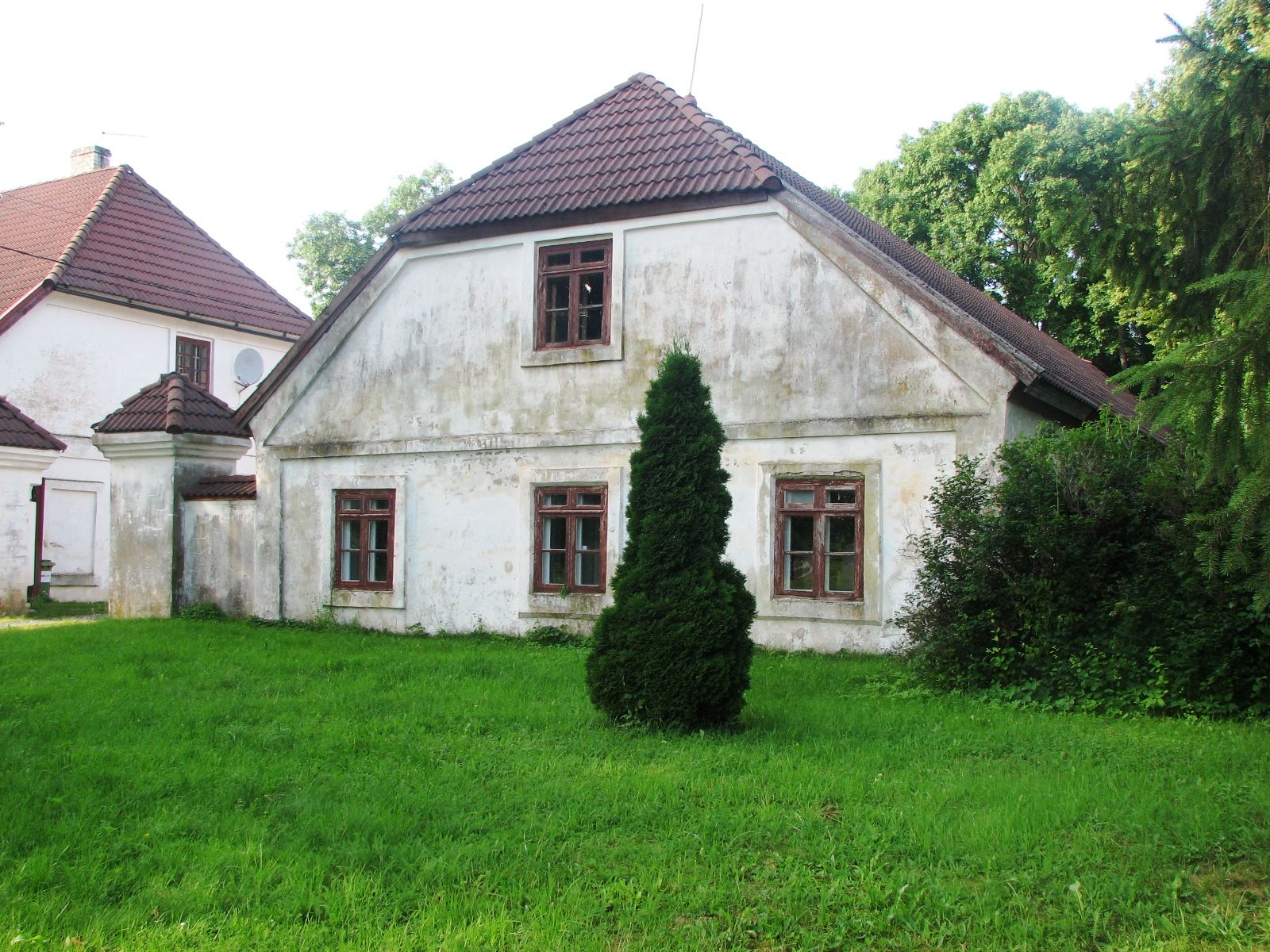 Lodja postijaama postipoiste elamu maanteepoolne ots